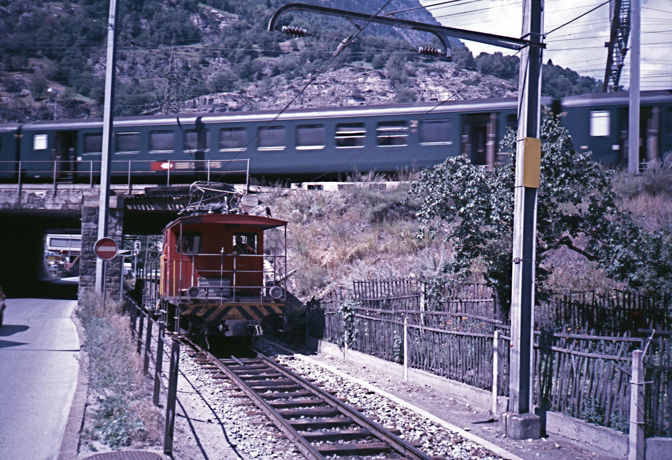 Alte Unterführung der FO in Brig